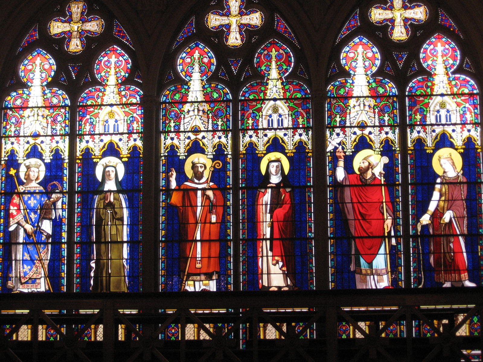 vitraux du transept sud de la chapelle royale, Dreux, Eure-et-Loir, France. De gauche à droite, Geneviève de Paris, Denis de Paris, Clotilde (femme de Clovis), Ferdinand, Amélie, Philippe. Les trois dernières représentations arborent les traits des membres de la famille royale.